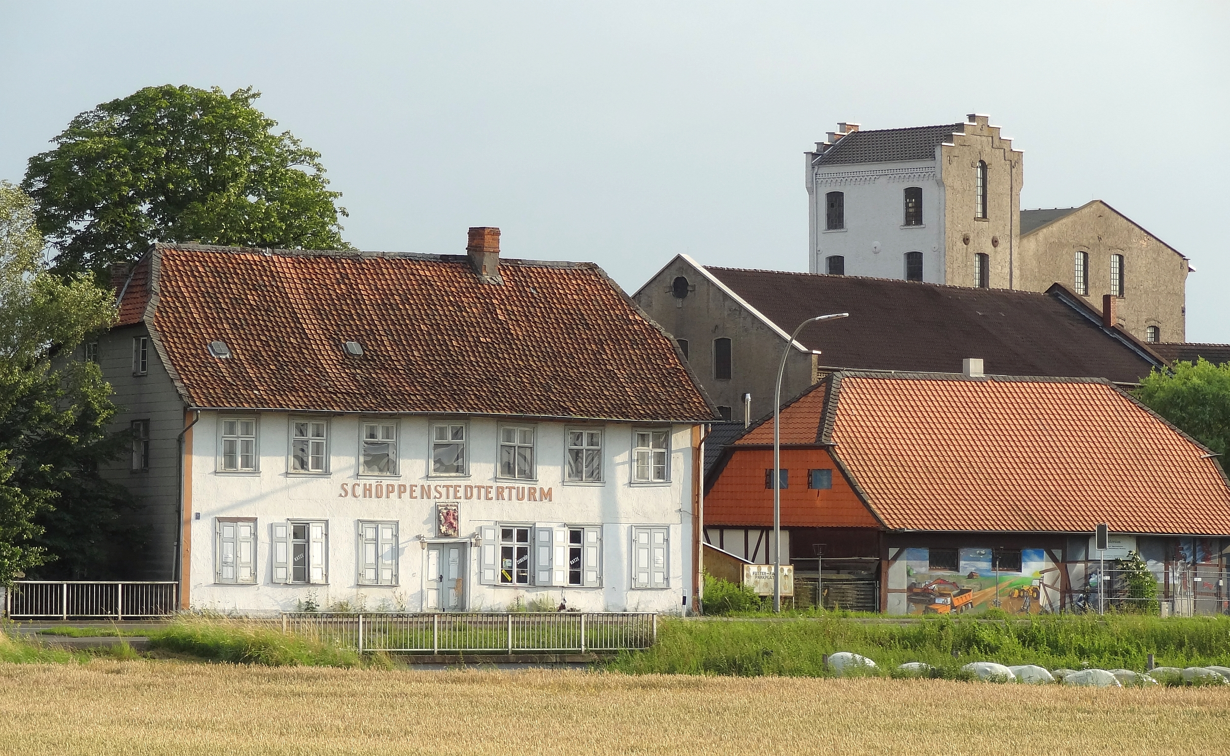 Schoeppenstedter Turm von Norden gesehen - im Hintergrund Relikte der ehem. Zuckerfabrik Rautheim.